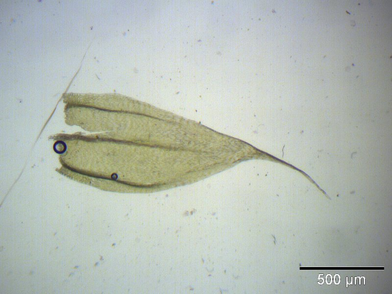 Weißes Kurzbüchsenmoos (Brachythecium albicans), Blatt, Vergrößerung: 40x